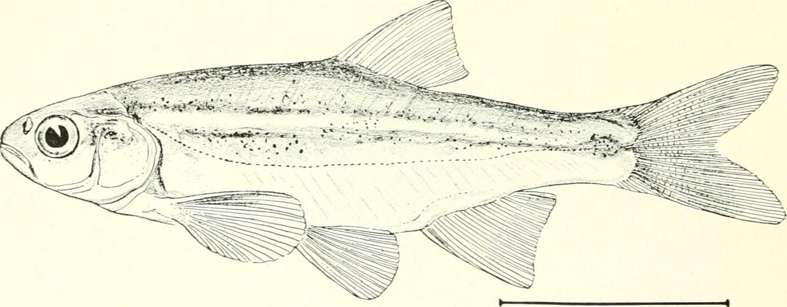 Richardsonius balteatus hydrophloe